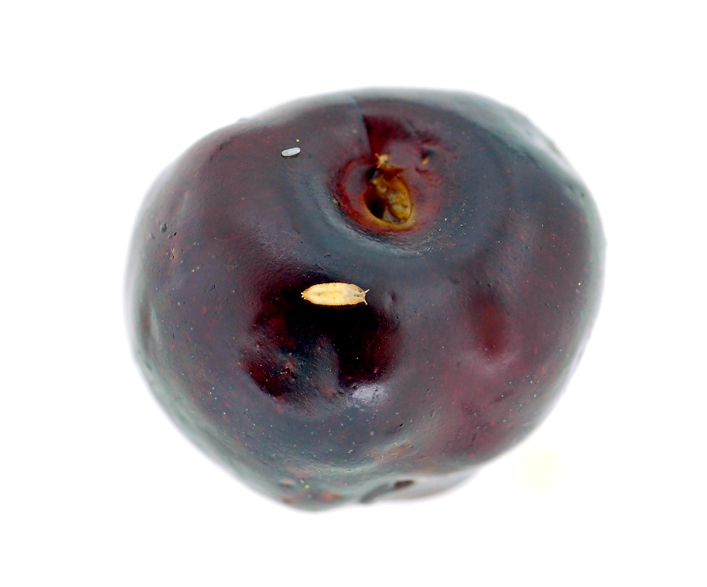 Drosophila suzukii Puppe auf einer Kirschfrucht- California